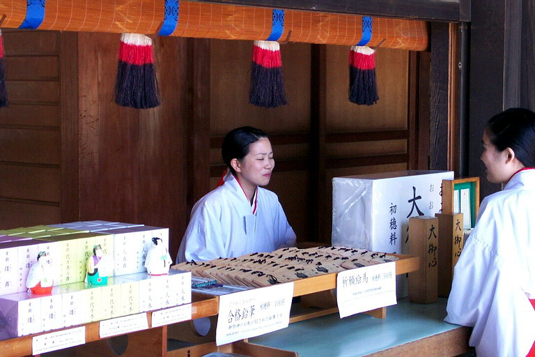 Miko at a shop in the Meiji shrine